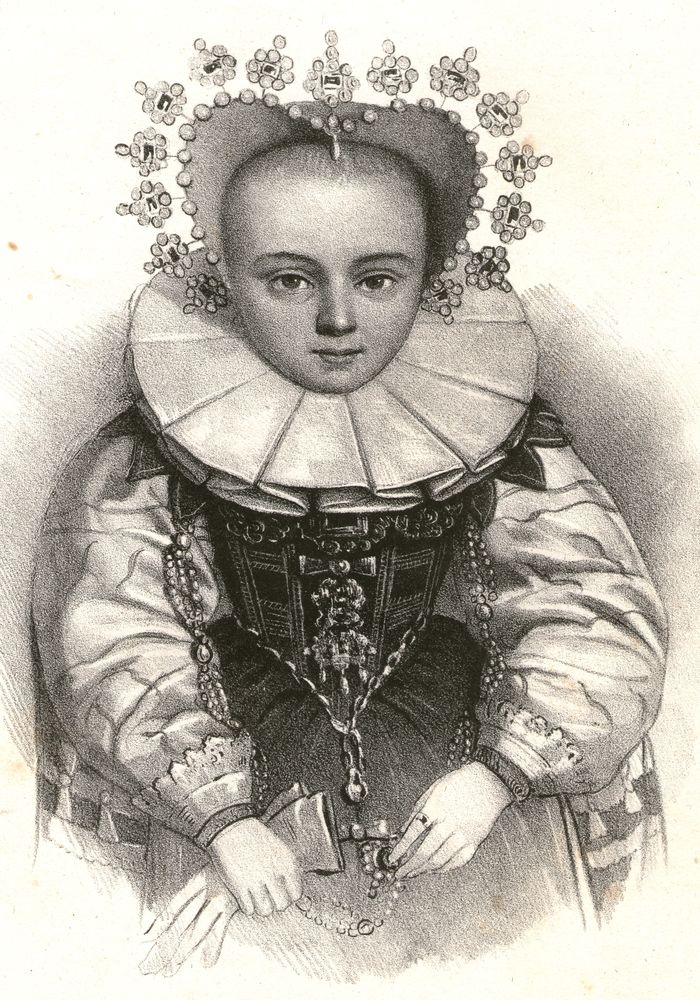 Dorota Sybilla Hohenzollern (1590-1625), księżna brzeska, żona Jana Chrystiana.